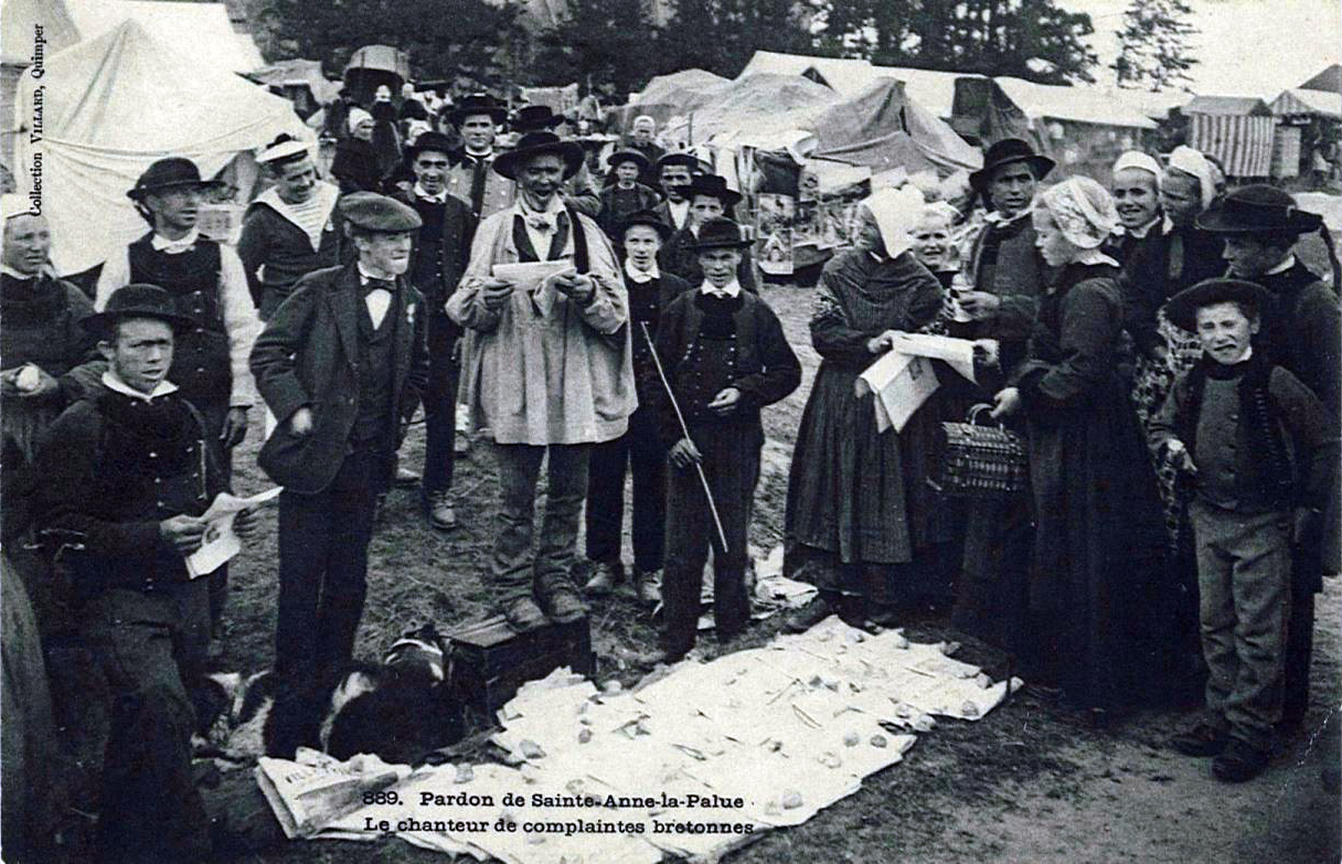 Pardon de Sainte Anne La Palud : Le chanteur de complaintes bretonnes. Elle montre ce qu'était l'activité des marchands de chansons sur feuilles volantes. Les pardons étaient les meilleures occasions car ils drainaient une foule nombreuse aussi avide de distractions que d'exercices pieux. Les tentes à l'arrière plan abritaient des petits commerces de souvenirs ou de friandises. Le chanteur est monté sur une caisse et ses feuilles volantes sont étalées à même le sol et maintenues en place par des cailloux. Pendant qu'il chante, sa femme (à droite) se charge de la vente. Ceux qui ont déjà acheté la chanson, comme l'homme placé à l'extrême gauche, suivent le texte interprété.